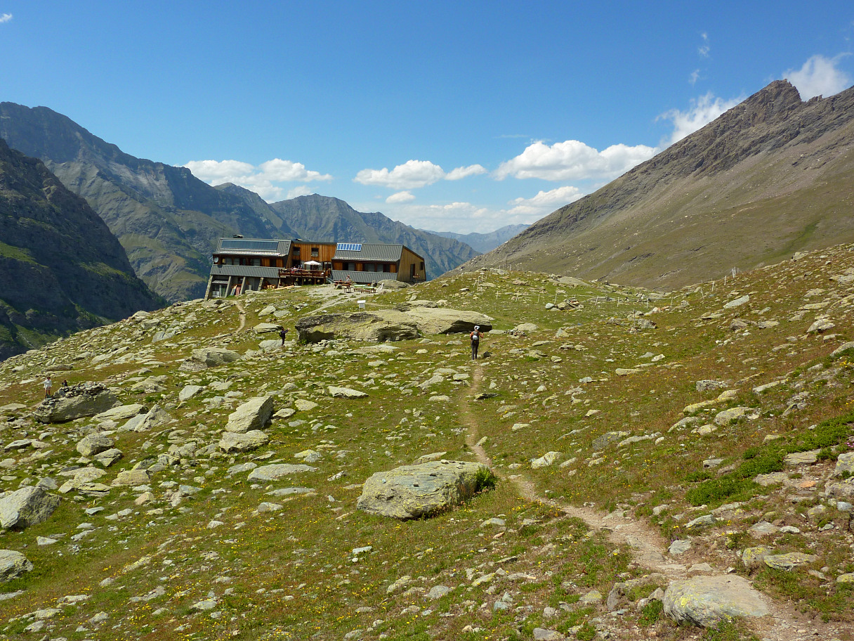 Il rifugio Viso nel comune di Ristolas